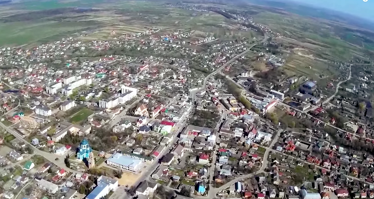 Аерозйомка міста